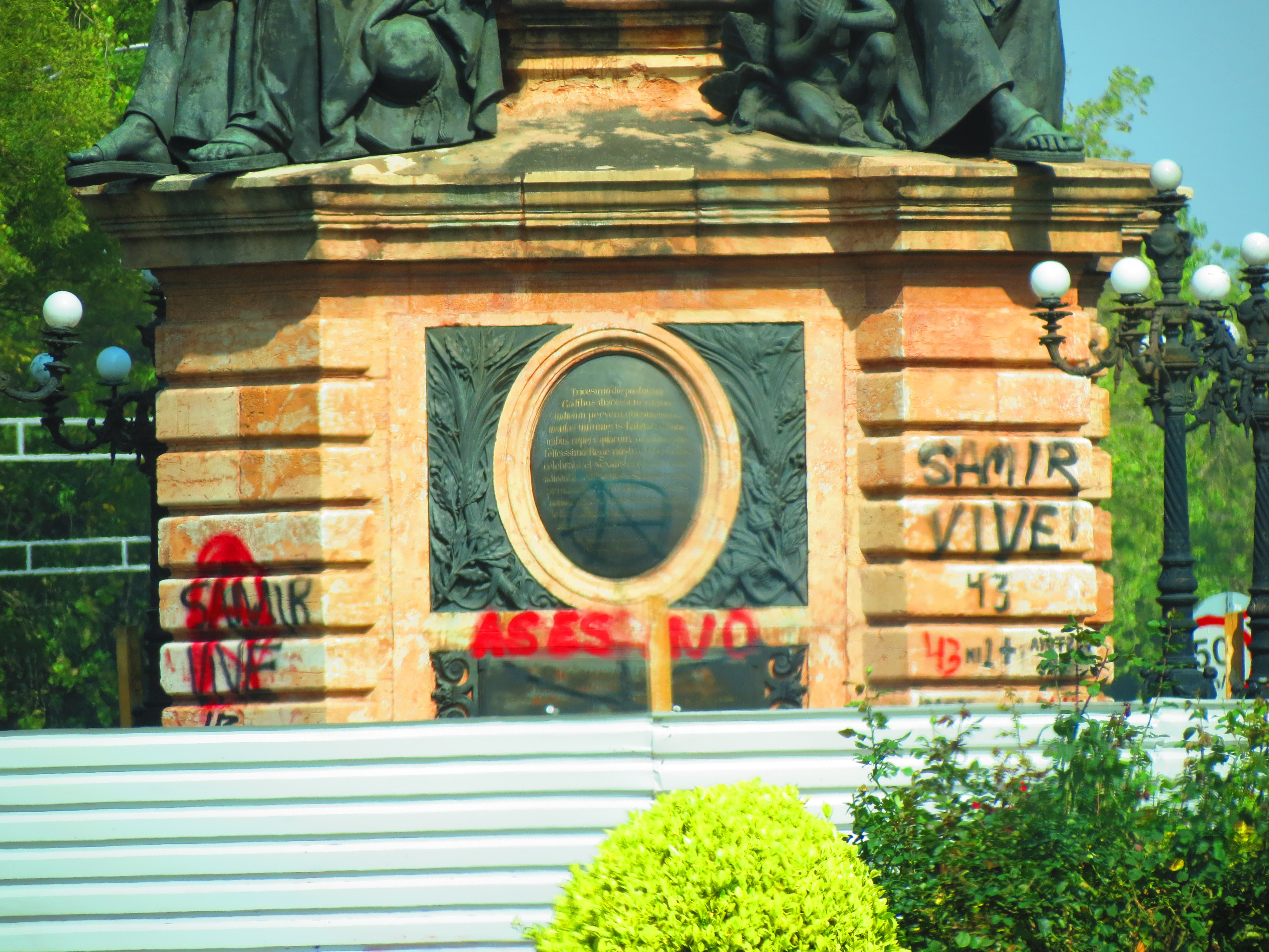 En la base, el monumento, se puede leer "Asesino" y "Samir vive", haciendo alusión al asesinato de Samir Flores Soberanes.